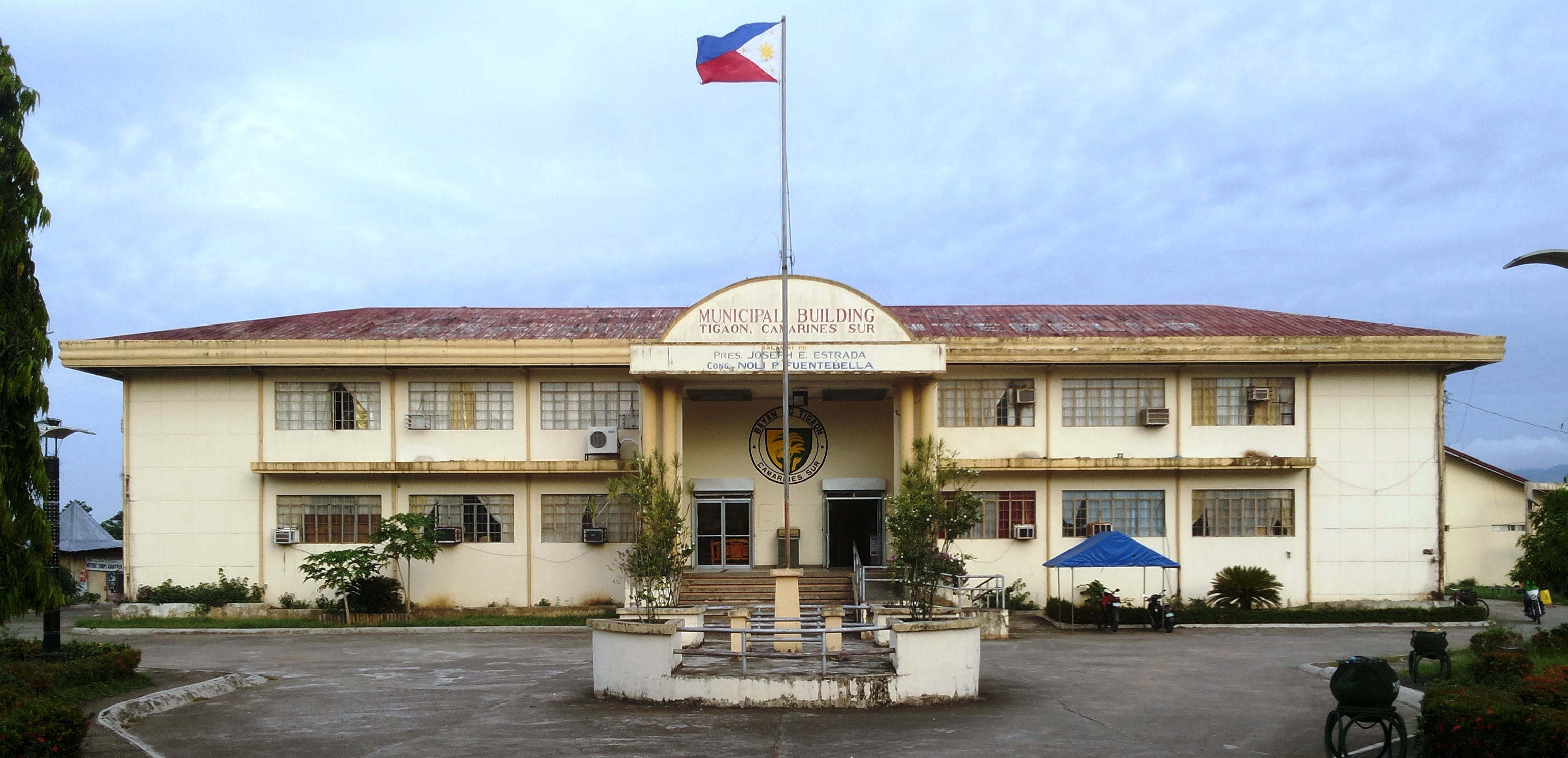 Bikol Central: munisipyo